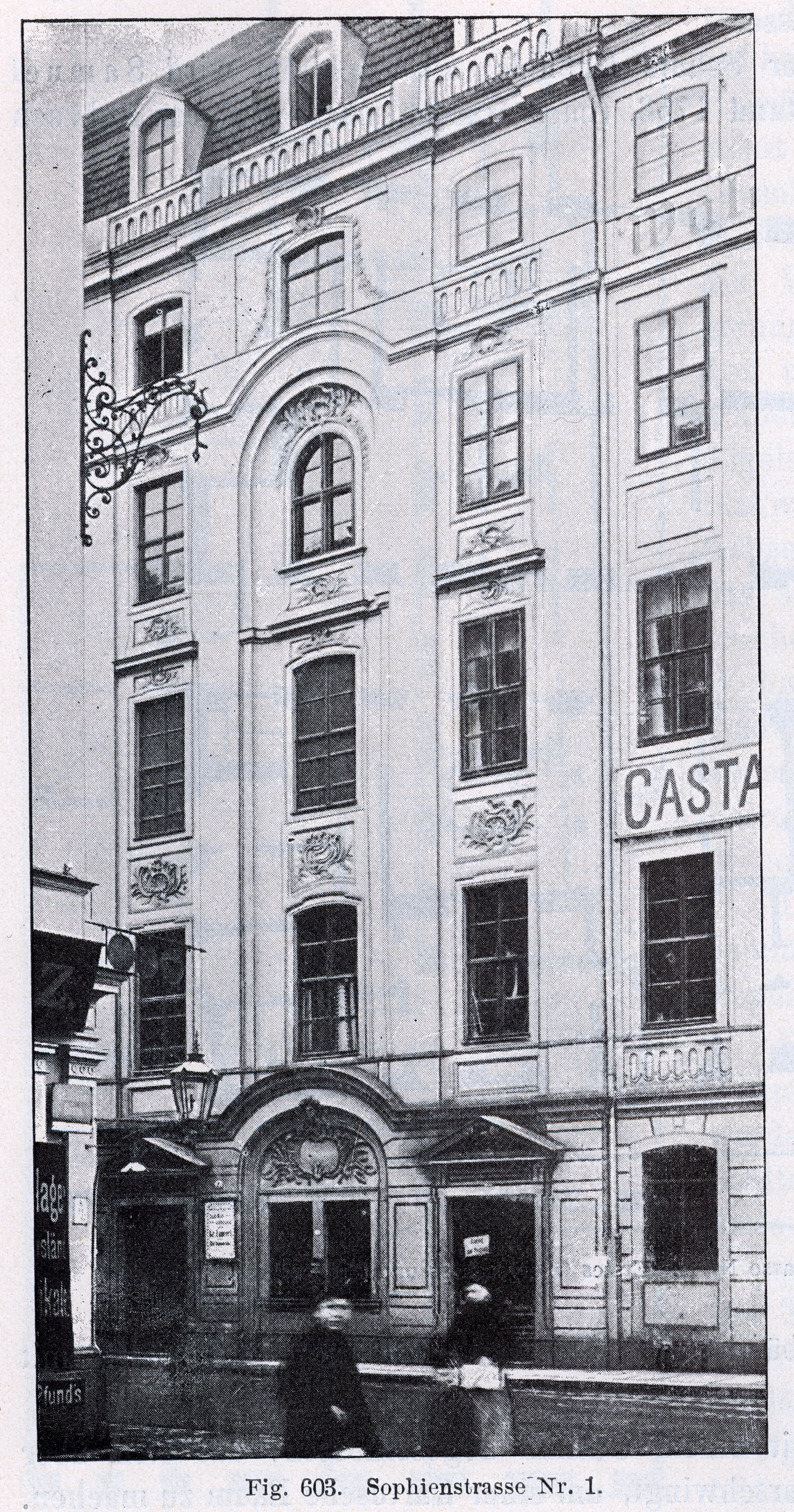 Adamsches Haus (Stadtwaldschlößchen) an der Sophienstraße 1 in Dresden, Ausschnitt